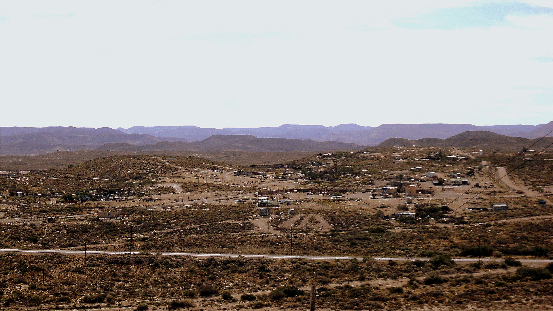 sector chacras del faro, nuevo espacio que se adicionó a Caleta Olivares